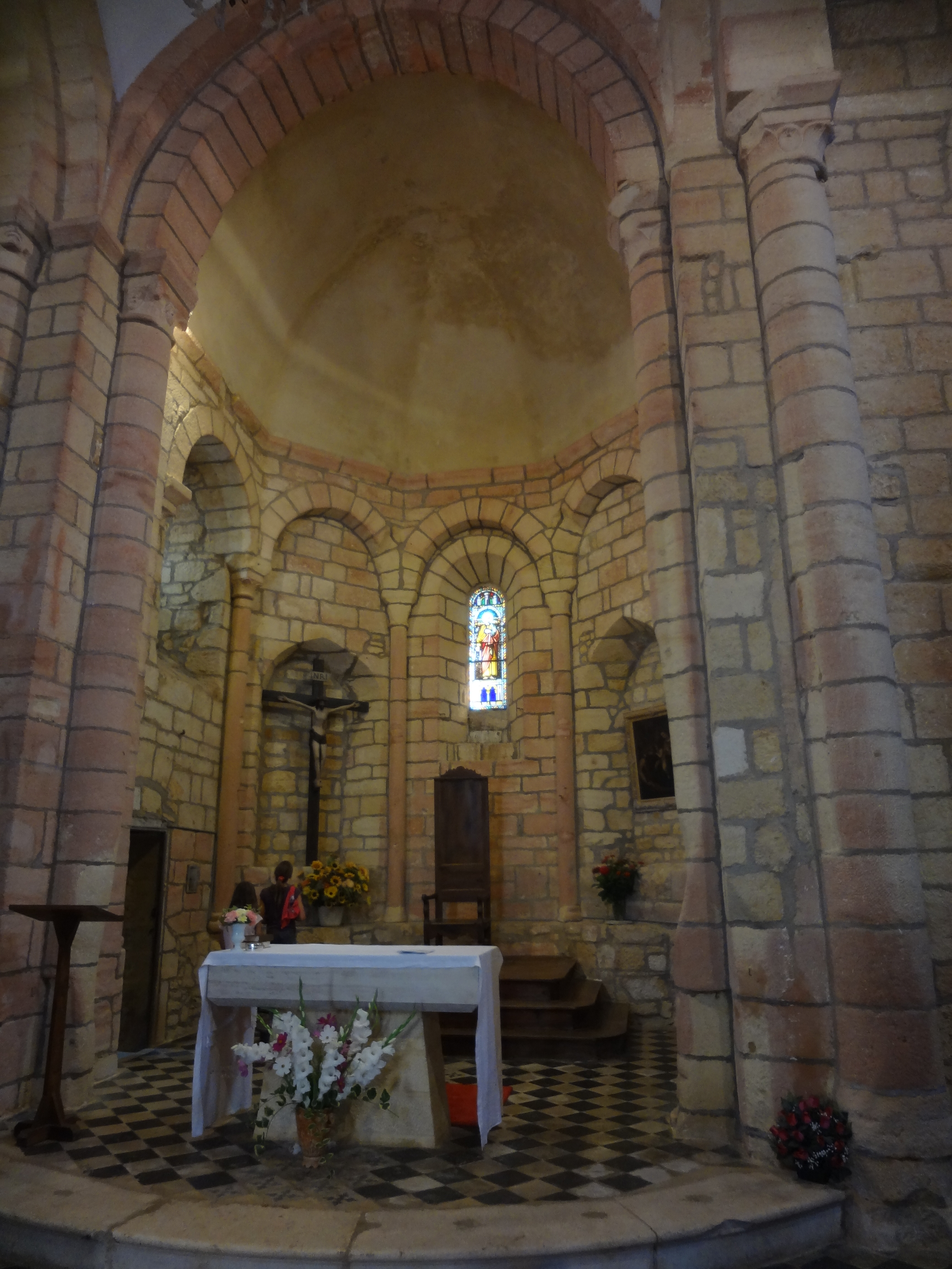 Paulin, église Saint-Pierre-ès-Liens, choeur